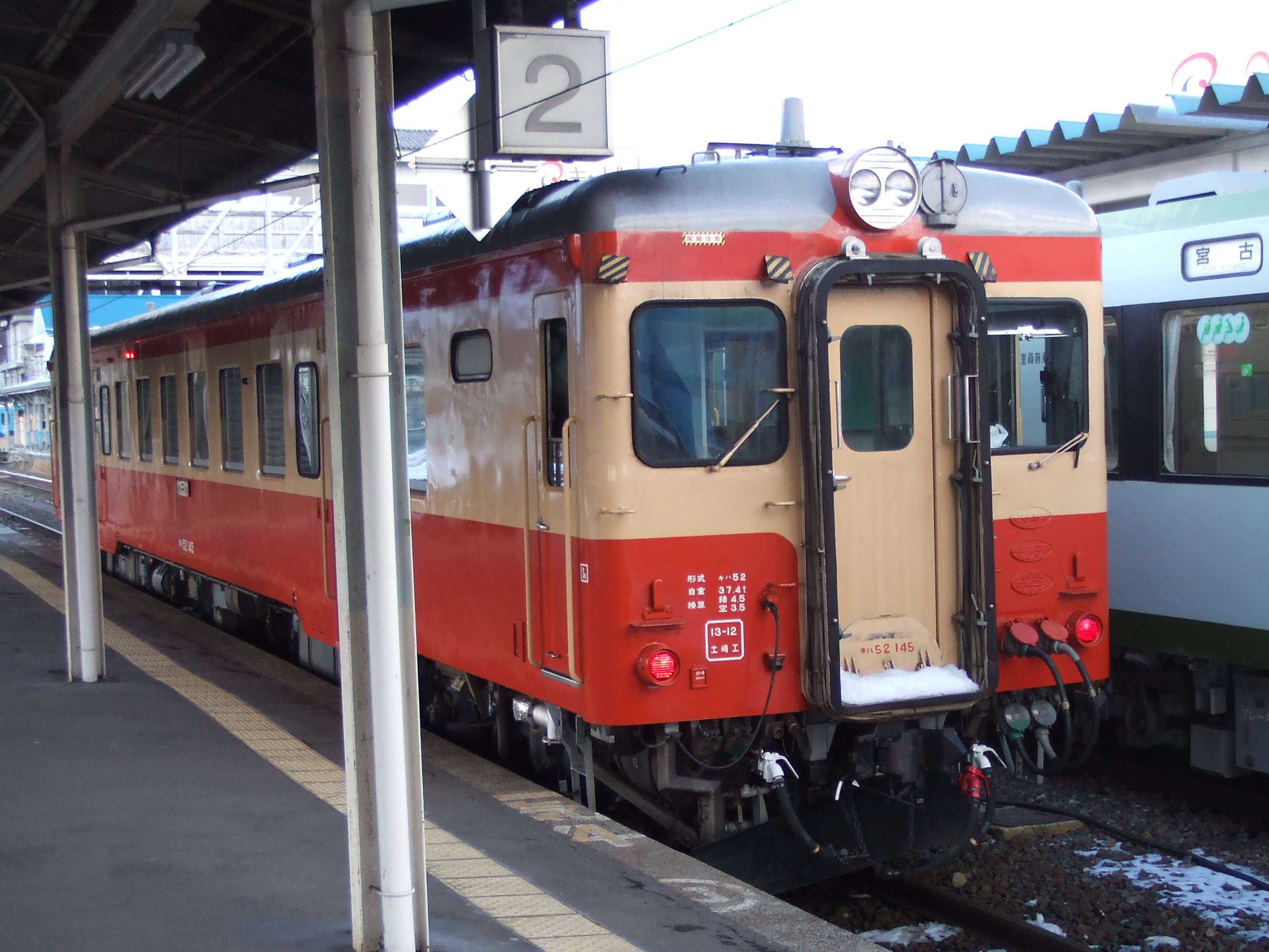 岩泉線 キハ52